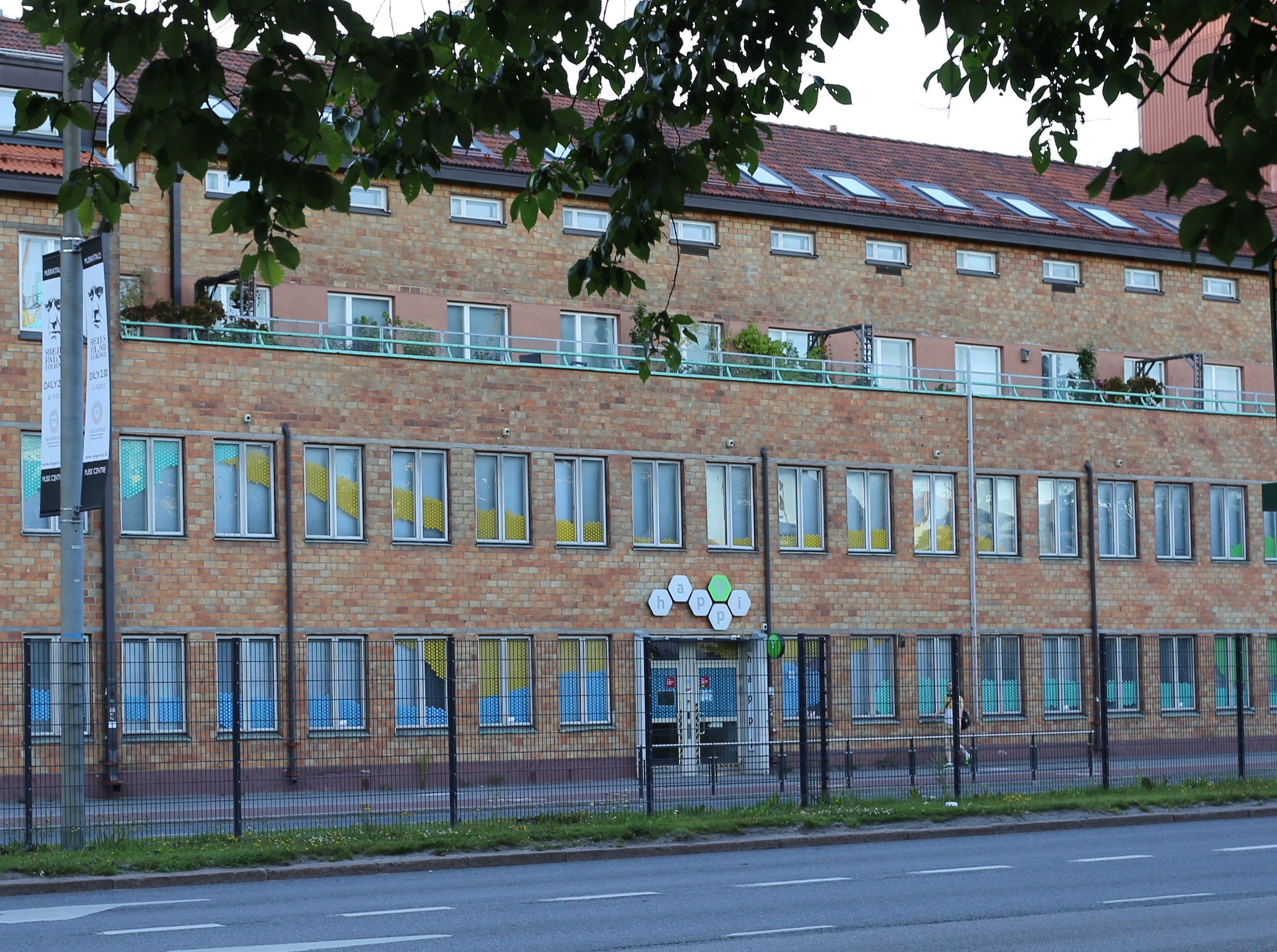 Nuorisokeskus Happi